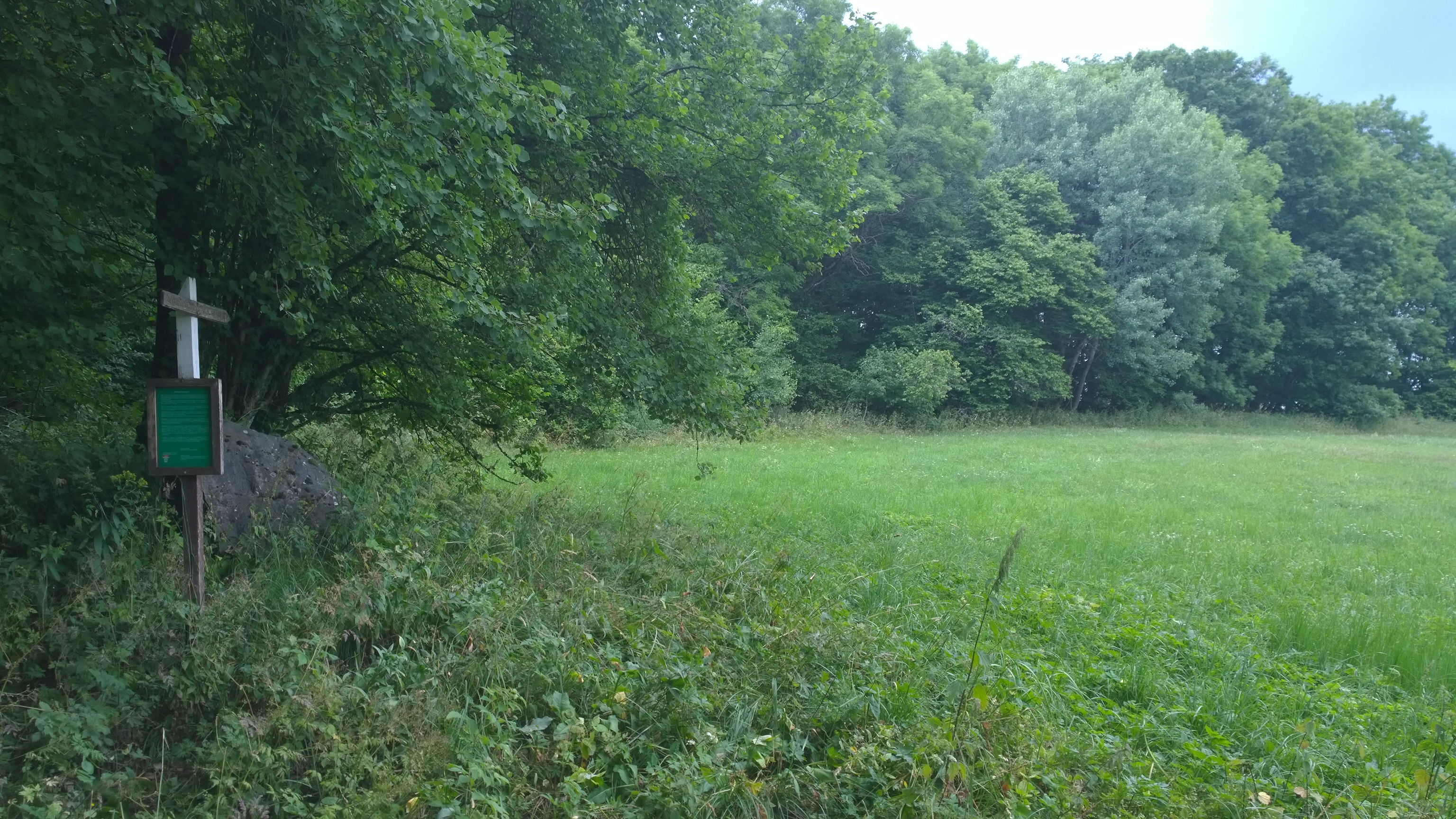 die Wüstung Hauenstein in der Rhön unterhalb des heutigen Rhönhofes Richtung Hausen (Rhön)